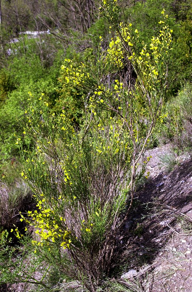 licence GFDL